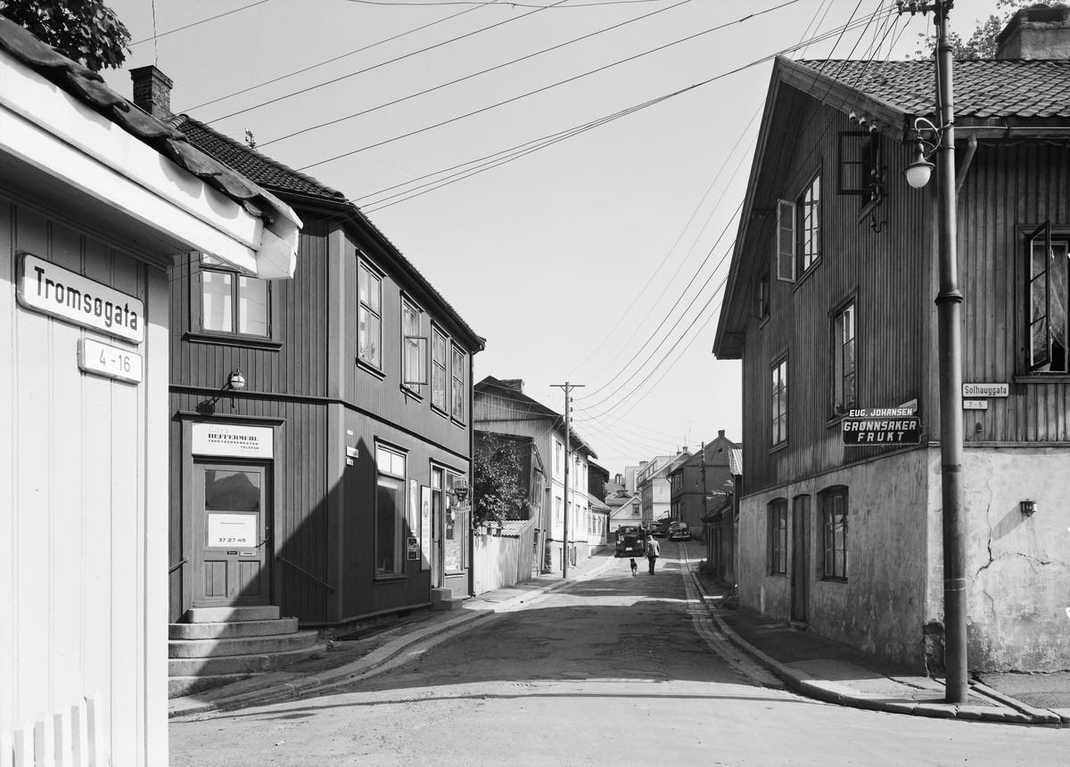 Tromsøgata sett fra Solhauggata mot Hammerfestgata